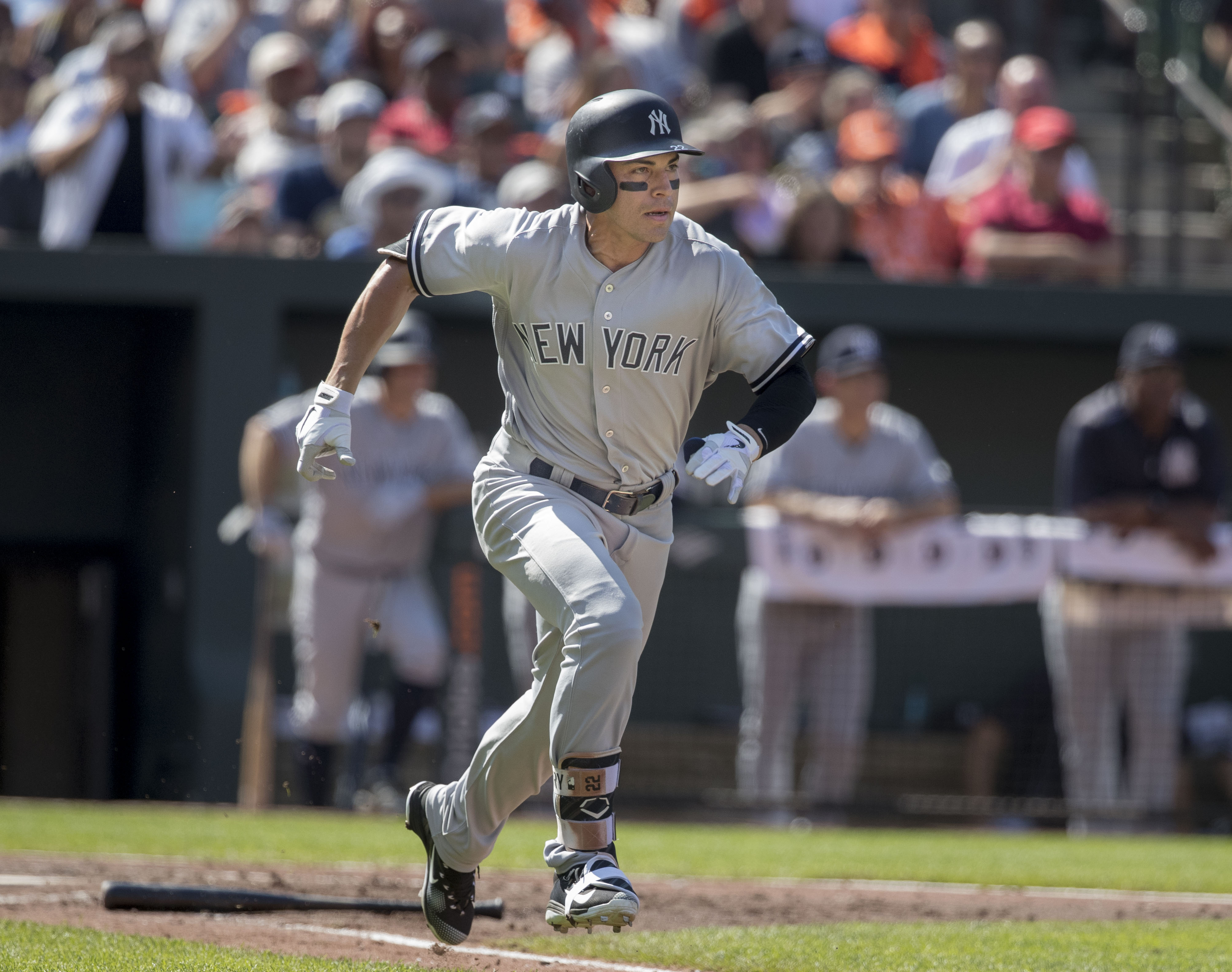 Yankees at Orioles 9/4/17